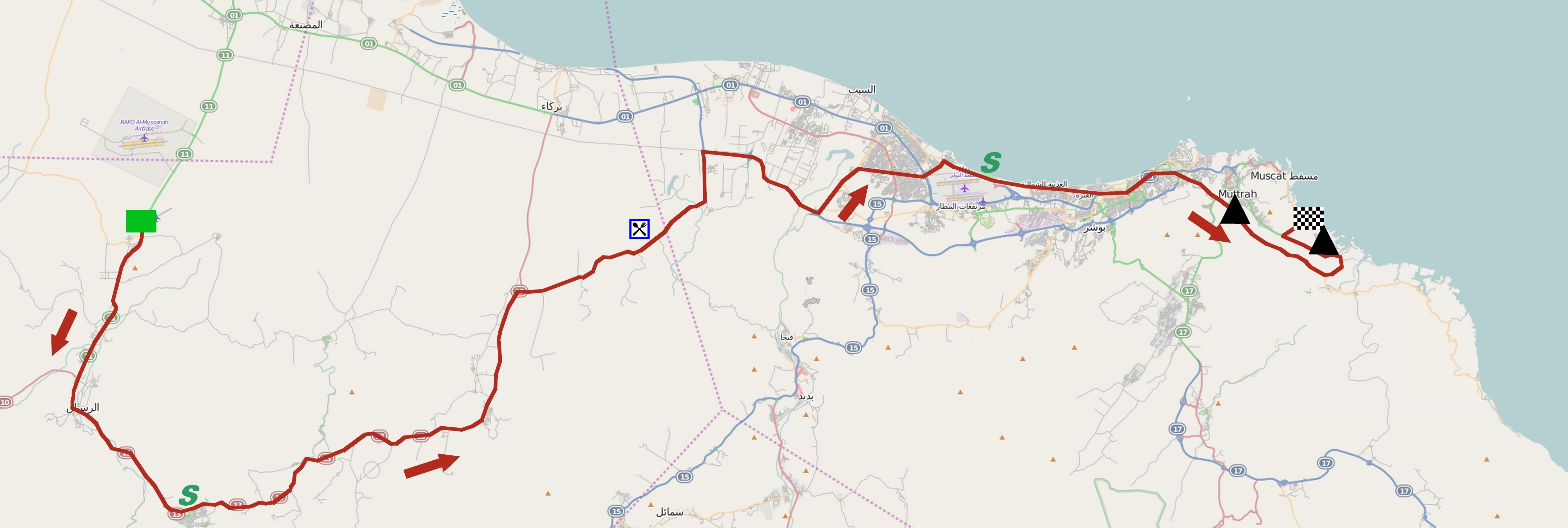 Parcours de la deuxième étape du Tour d'Oman 2015. This map may be incomplete, and may contain errors. Don't rely solely on it for navigation.